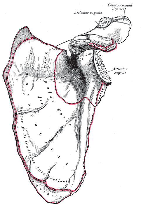 Left scapula, anterior surface or venter